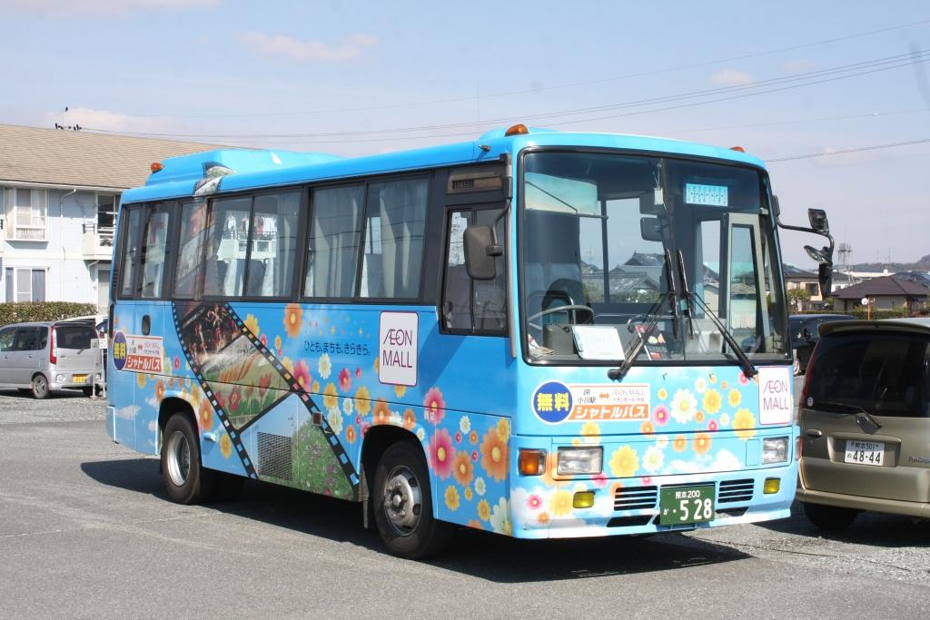 中九州観光が運行するイオンモール宇城無料シャトルバス